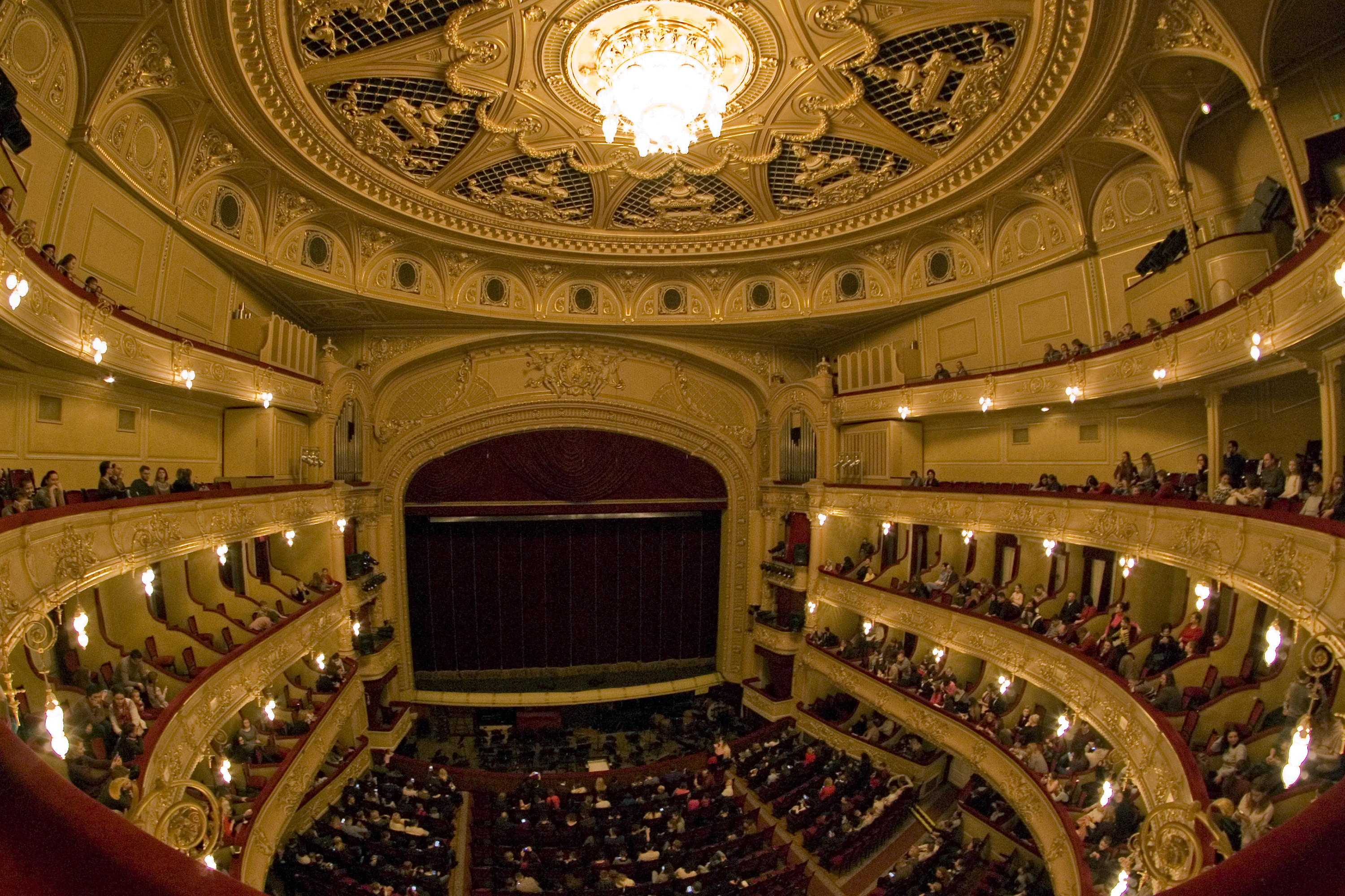 Театр опери балету ім. Т. Г. Шевченка, Київ, вул. Володимирська, 50